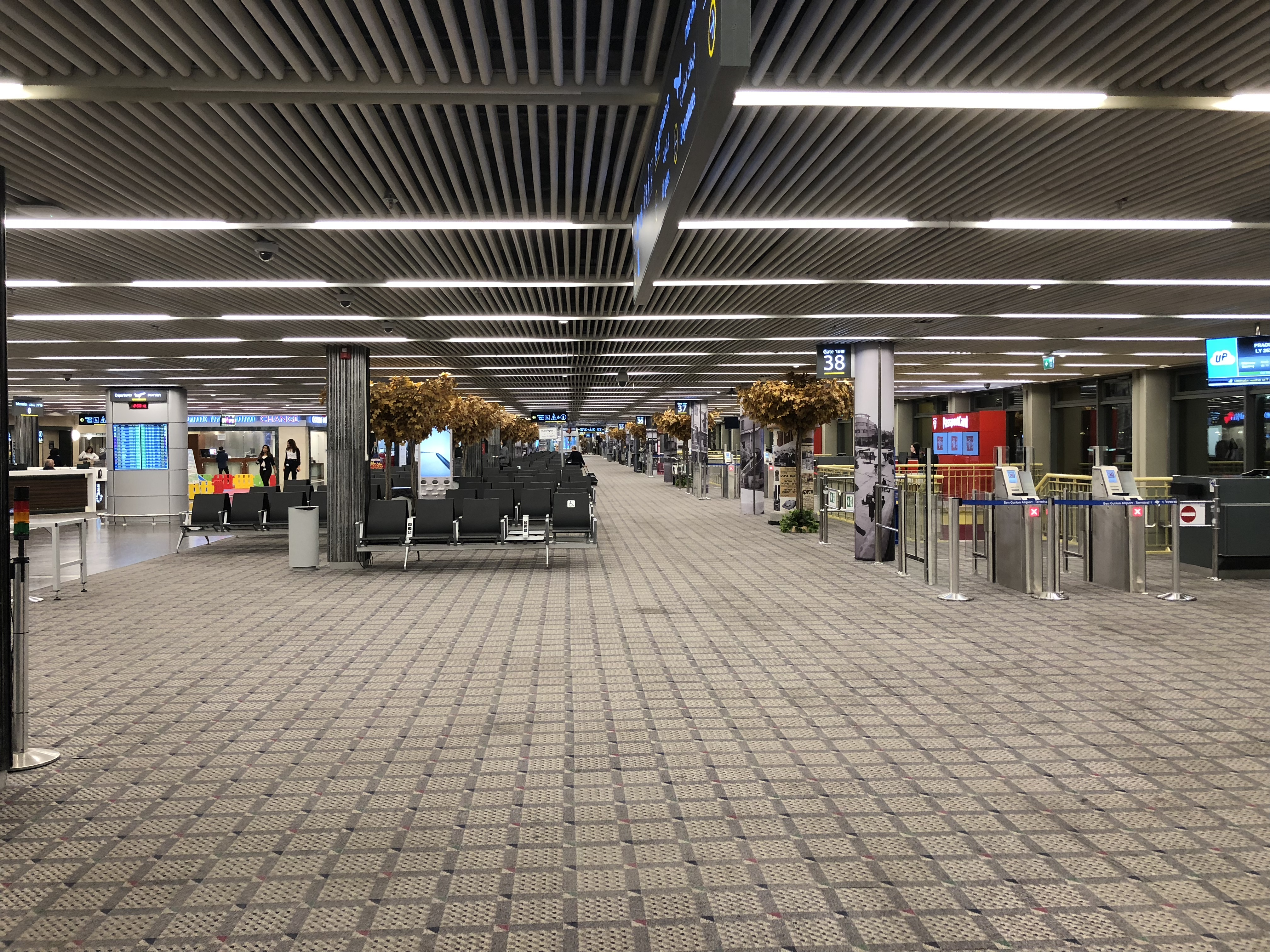 תמונה של טרמינל 1 בנתב״ג (2017)